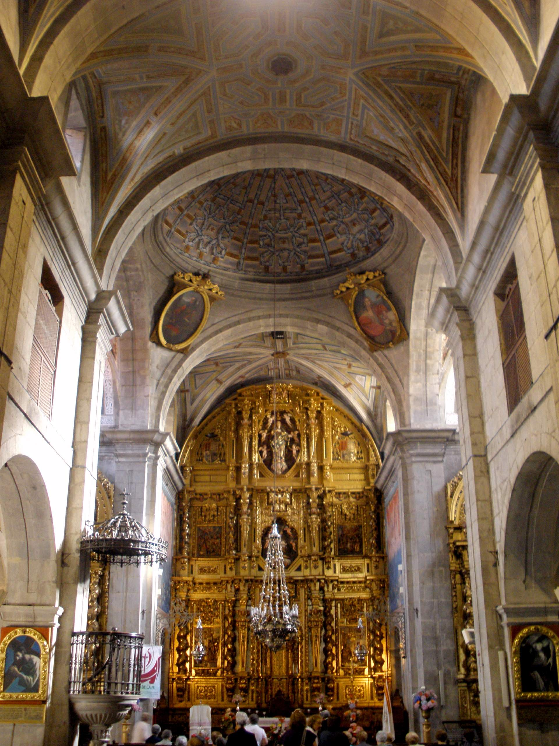 Iglesia de Santa María la Mayor (Pravia, Asturias)